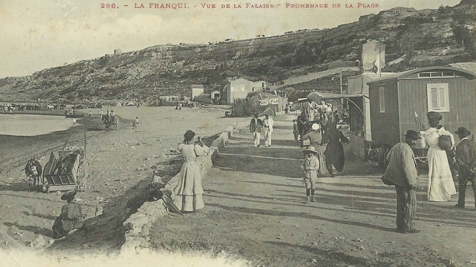 Plage et falaise de La Franqui, près du Cap Leucate (Aude). Carte postale publiée vers 1902-1905 (la photo peut être plus ancienne). Henry de Monfreid (1879-1974) passa toute sa jeune enfance, puis par la suite de nombreux étés, dans cette petite station balnéaire où la famille de sa mère exploitait un établissement pour vacanciers. "La perspective de la rentrée flétrissait toutes mes joies, qui s'en allaient, en ces jours d'automne, comme tombent les feuilles jaunies. Partir, m'en aller sans esprit de retour sur cette mer aujourd'hui toute bleue, qui semblait me sourire... m'appeler. Ce n'est pas en vain que fut inventé le mythe des sirènes." (Le Feu de Saint-Elme, p. 50. Monfreid avait alors plus de 90 ans)